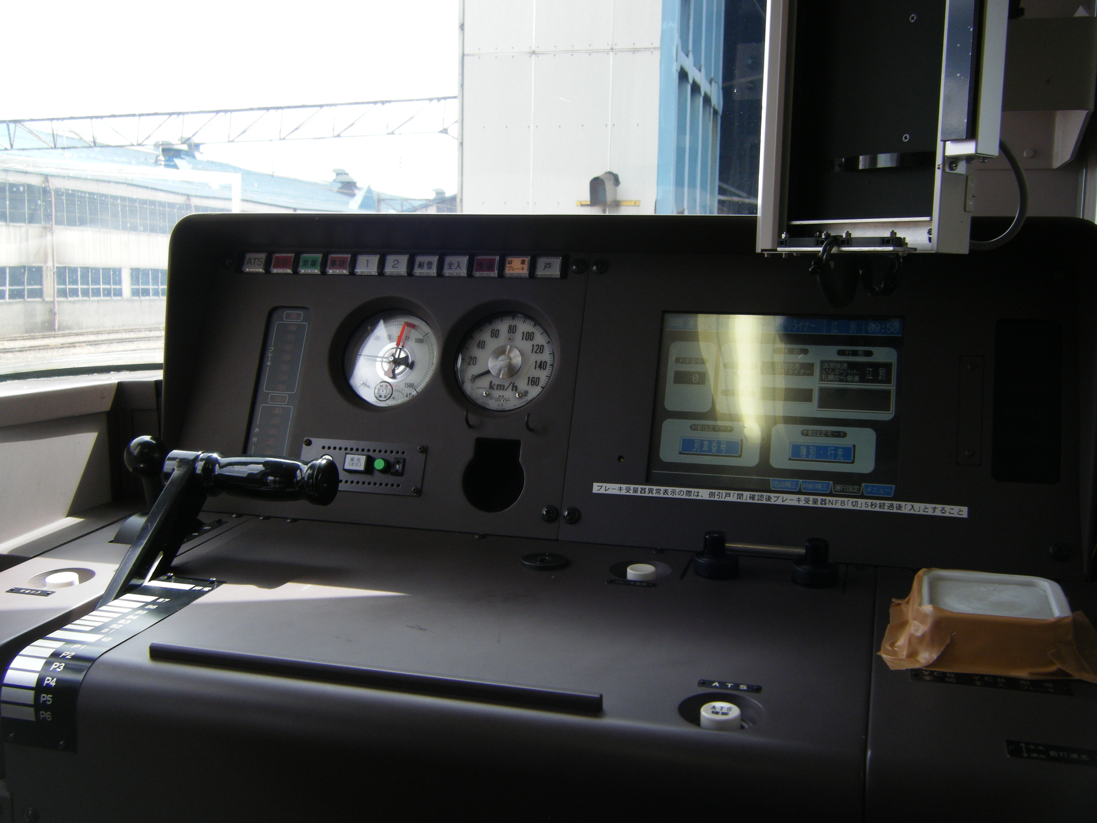 JR北海道735系電車運転台